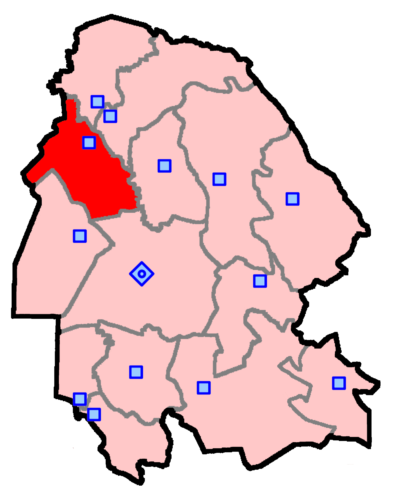 حوزهٔ انتخاباتی شوش برای انتخابات مجلس شورای اسلامی